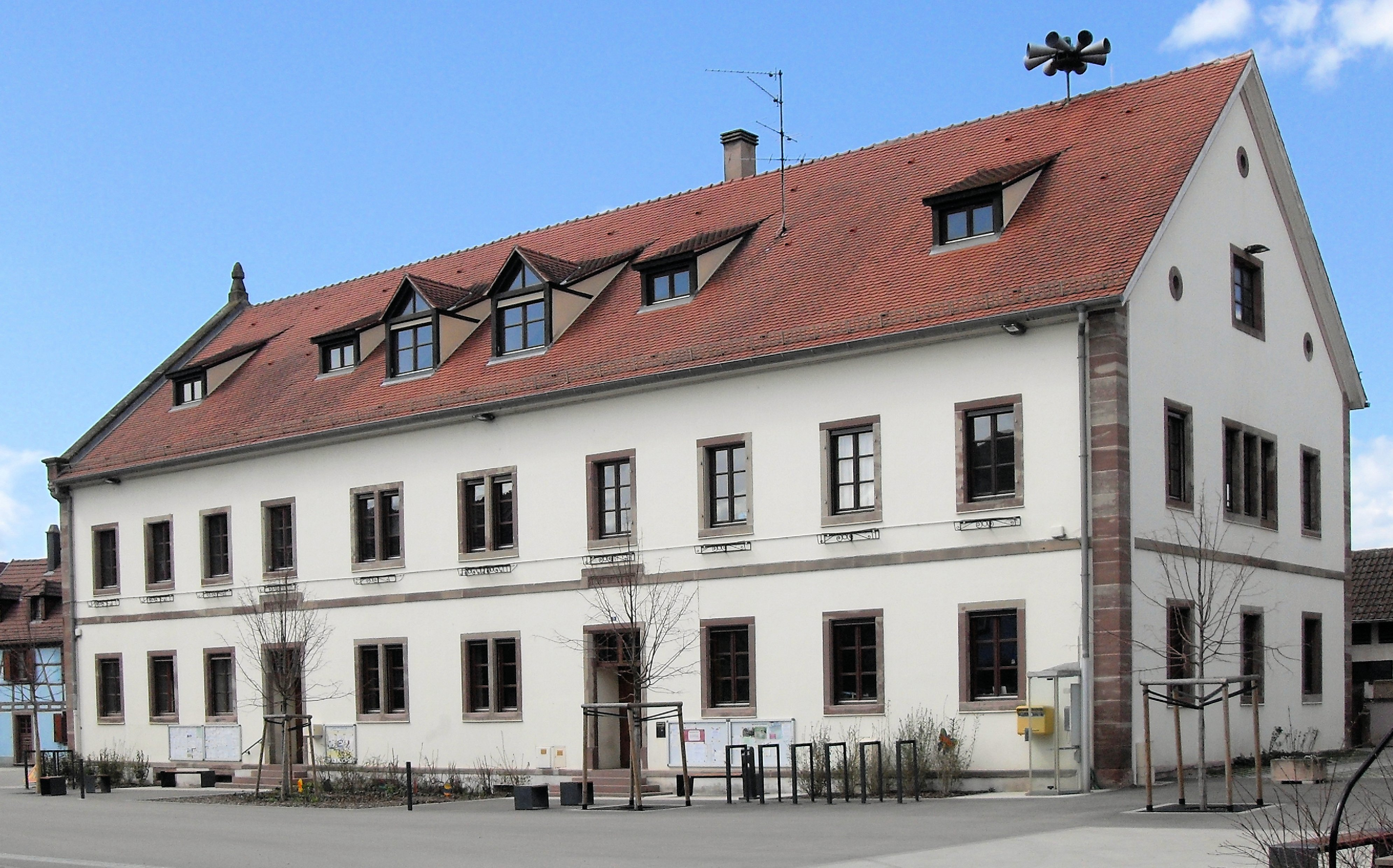 La mairie d'Ebersheim